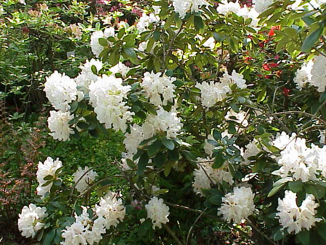 Species: 'Rhododendron campanulatum subsp. campanulatum' Family: Ericaceae Image No. 5